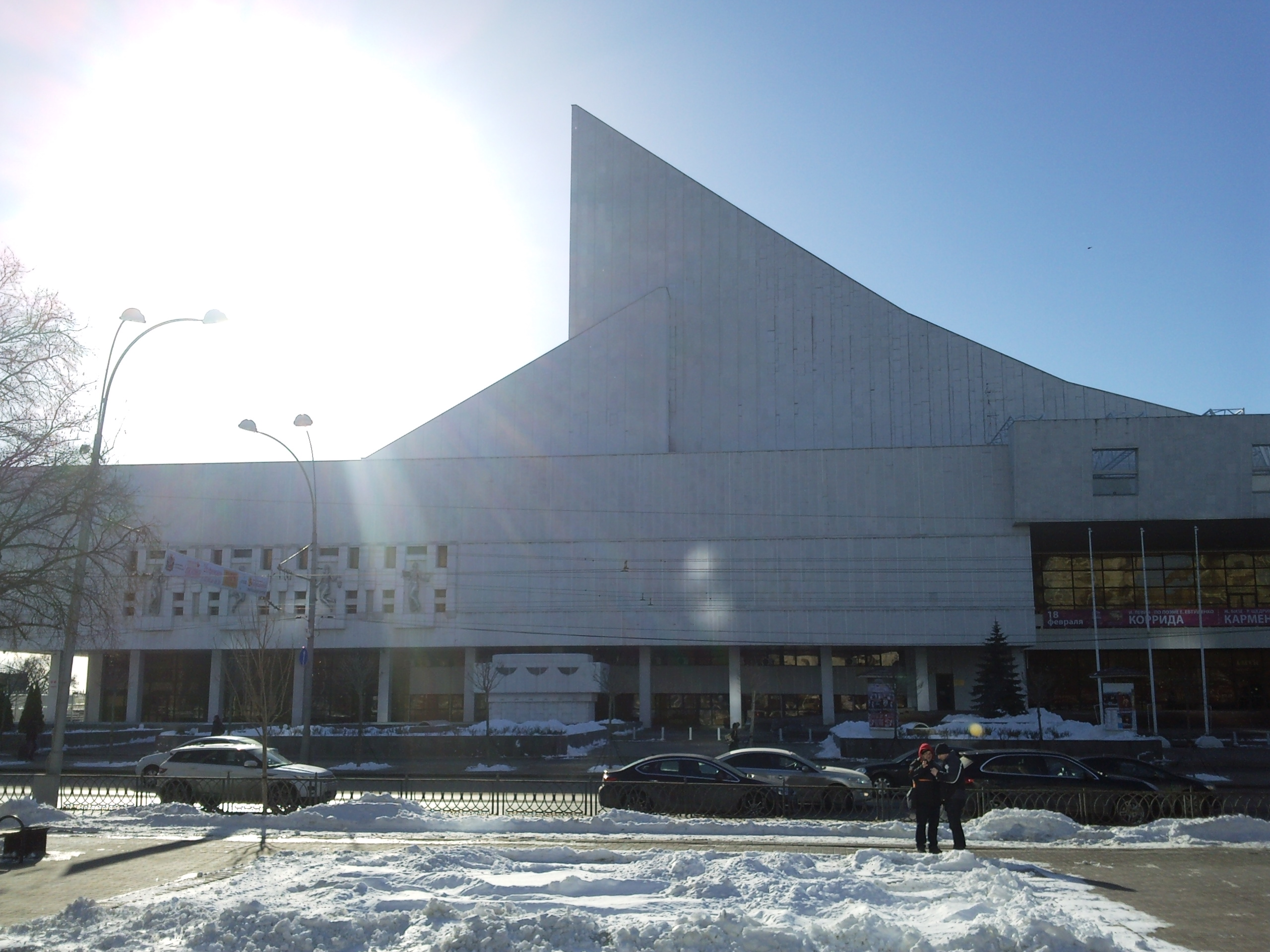 Один из крупнейших музыкальных театров на Юге России.